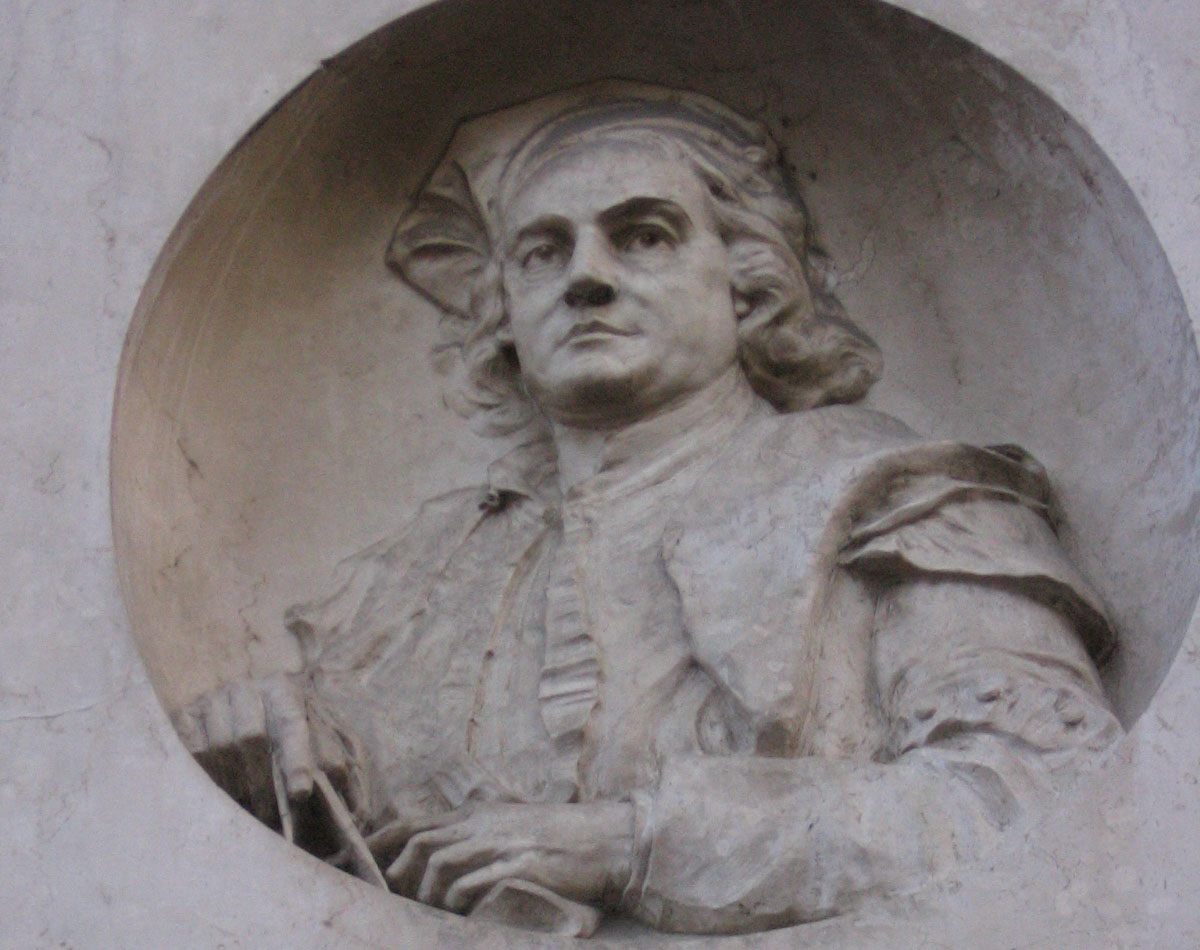 Rilievo di Giovan Battista Caniana, Basilica di San Martino, Alzano Lombardo, Bergamo, Italia